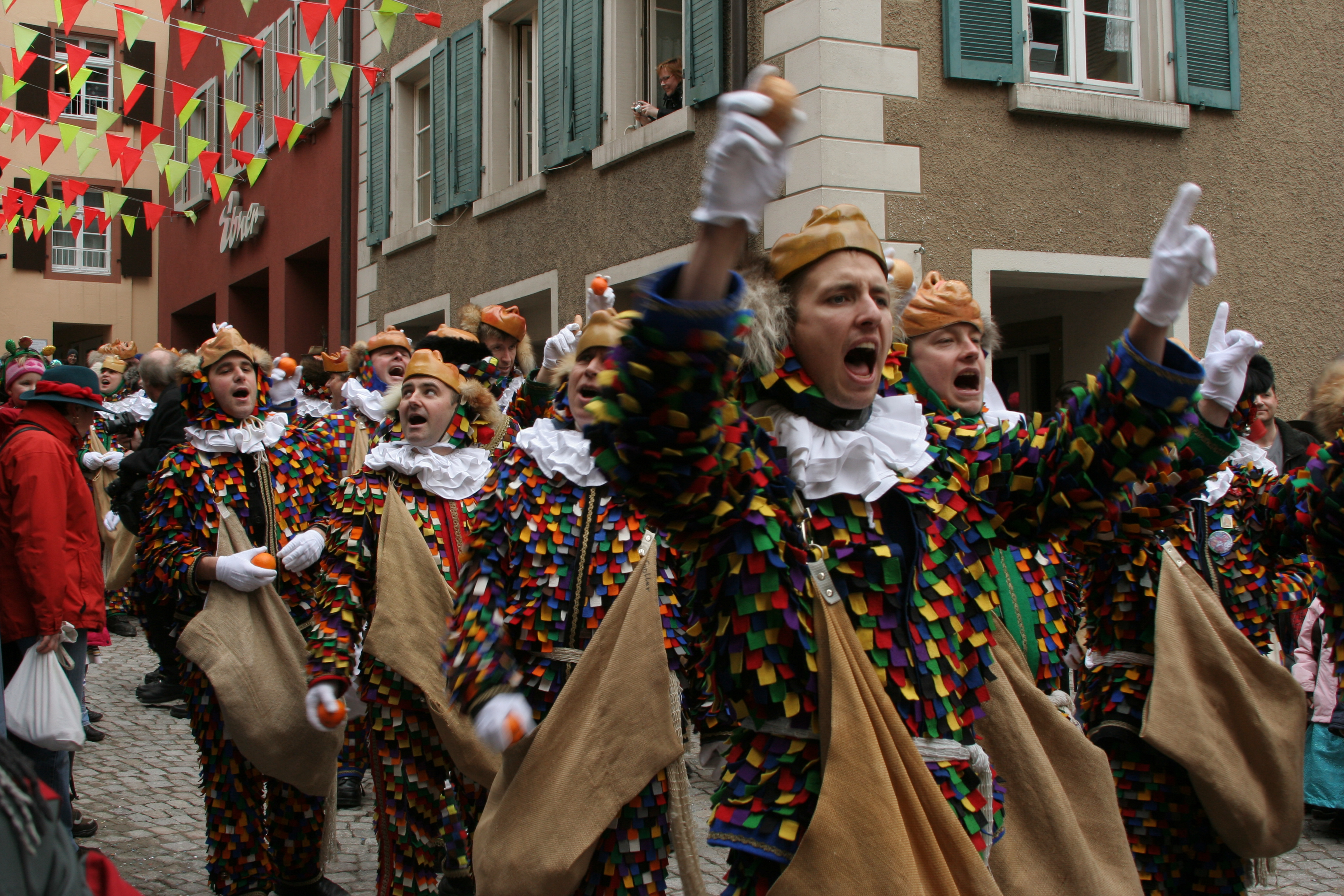 Mitglieder der Narro-Altfischerzunft beim Narrolaufen 2009